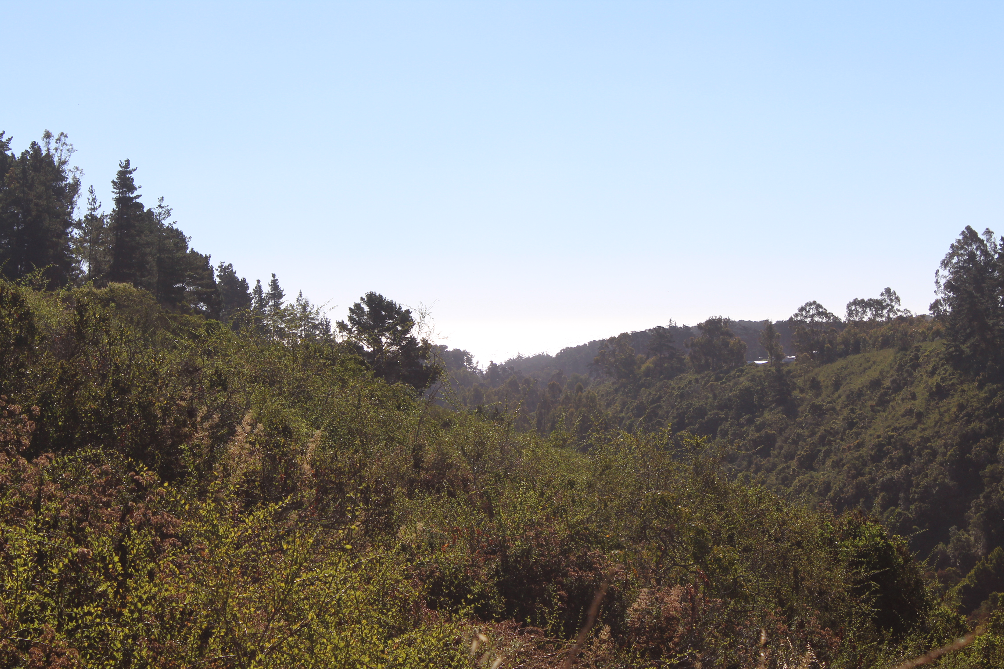 Imagen tomada desde las alturas para identificar la ruta de La Quebrada de Córdoba, en el Tabo, V Región